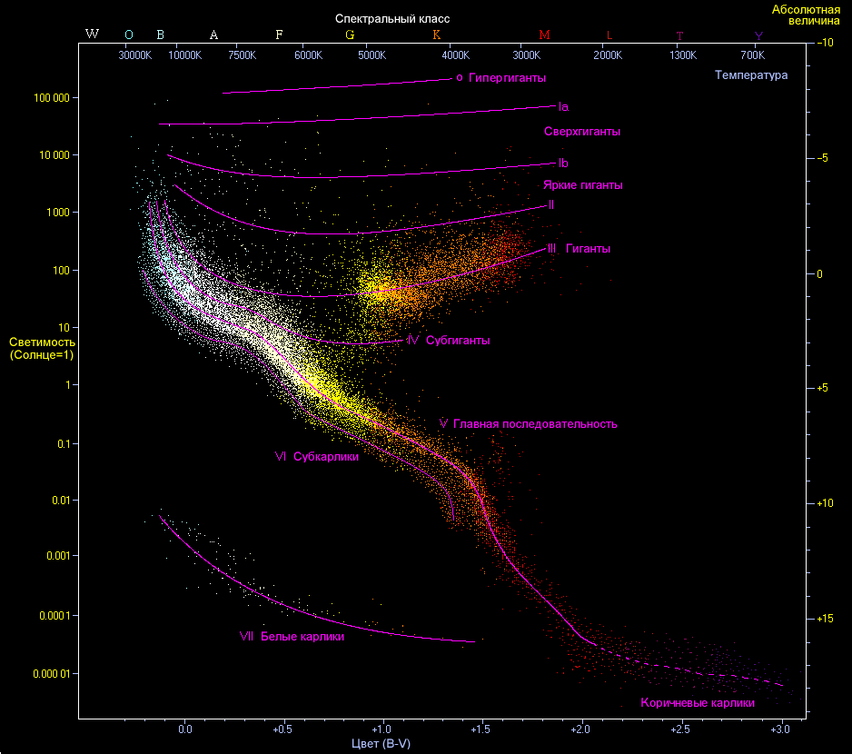 Диаграмма Герцшпрунга—Рассела с русскими надписями